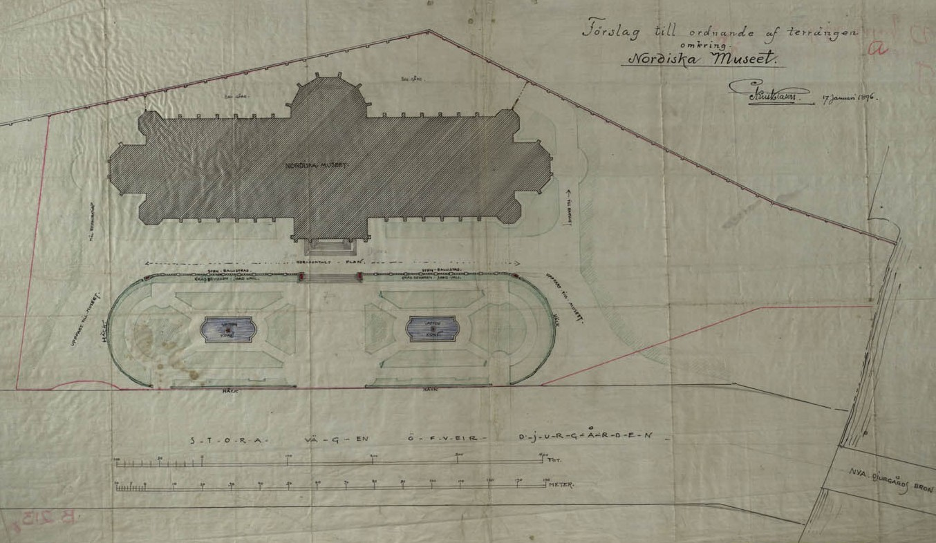 Depicted place: Stockholm, Nordiska museet, Djurgården (Sverige (SE))